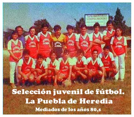 Esta Selección Juvenil de La Puebla en Heredia, disputó con gran coraje deportivo un cupo en los Juegos Deportivos Nacionales de esa época. Lamentablemente no logró su objetivo y su fortaleza se reflejaba por las bandas ya que tenia dos carrileros sumamente rapidos y goleadores. Algunas de sus figuras fueron tomadas en cuenta para reforzar a su similar de San Pablo de Heredia; el cual si clasificó para esa eliminatoria regional en la categoría, U 17 de fútbol. Este grupo se distinguió por sus dotes técnicos y lucha futbolística en la cancha. Exhibiendo velocidad, inteligencia y capacidad para anotar.